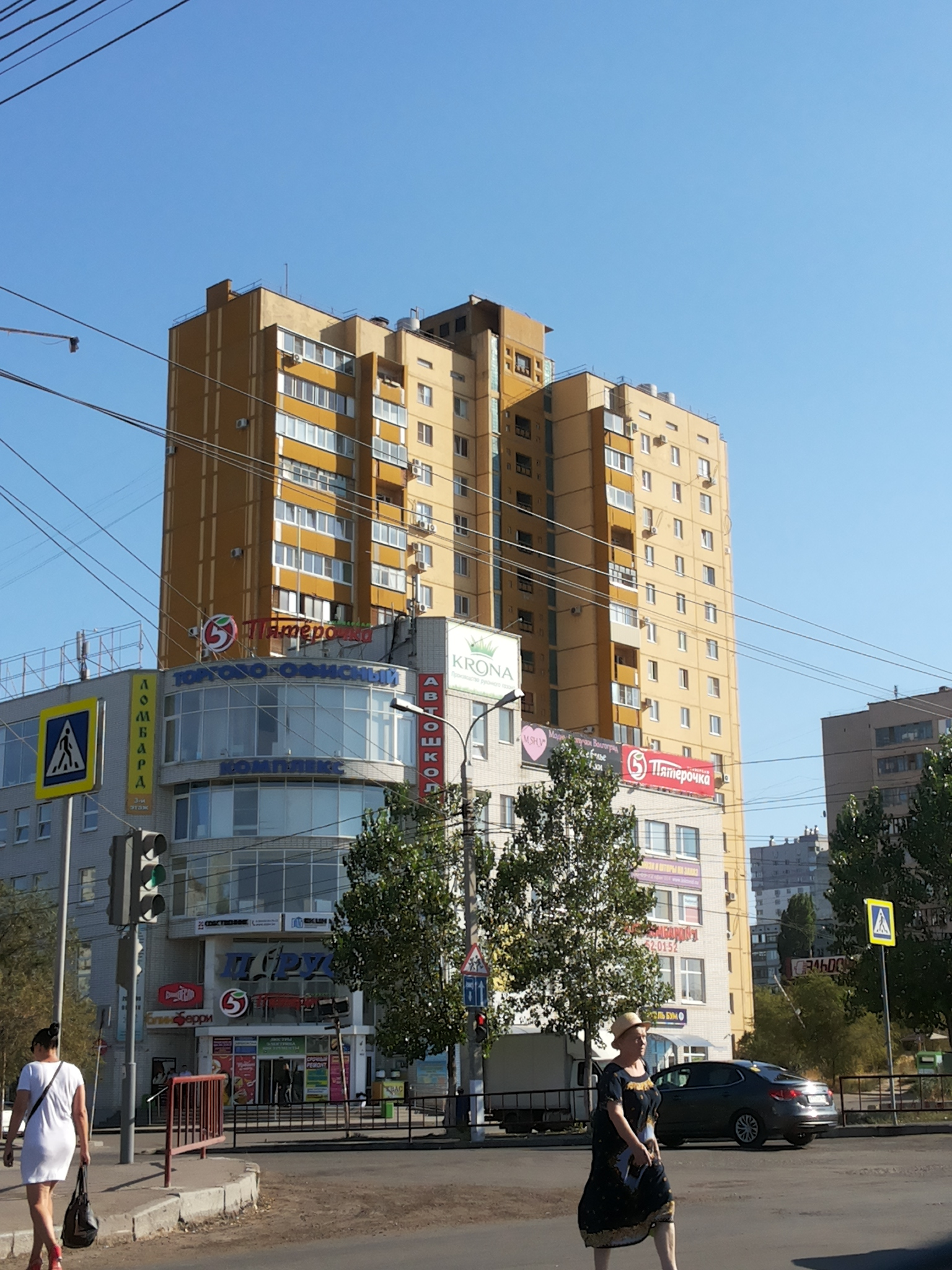 Елецкая улица, 19